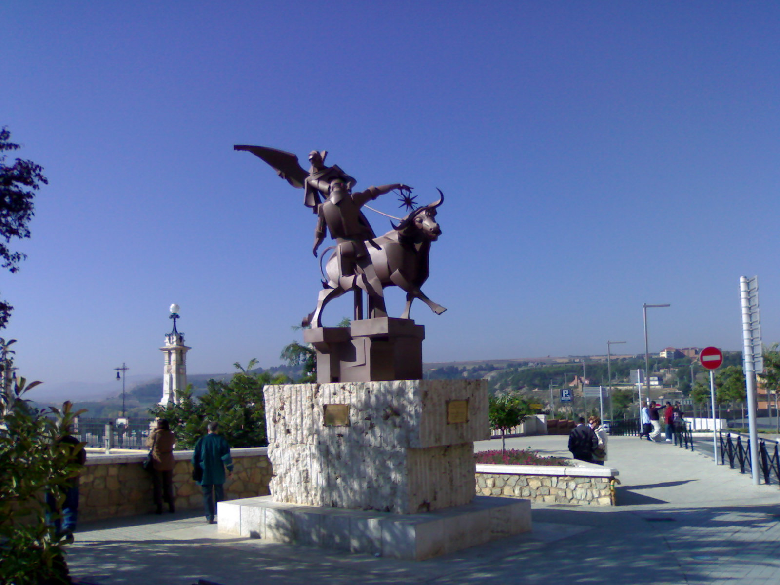 Monumento a la fundación de Teruel